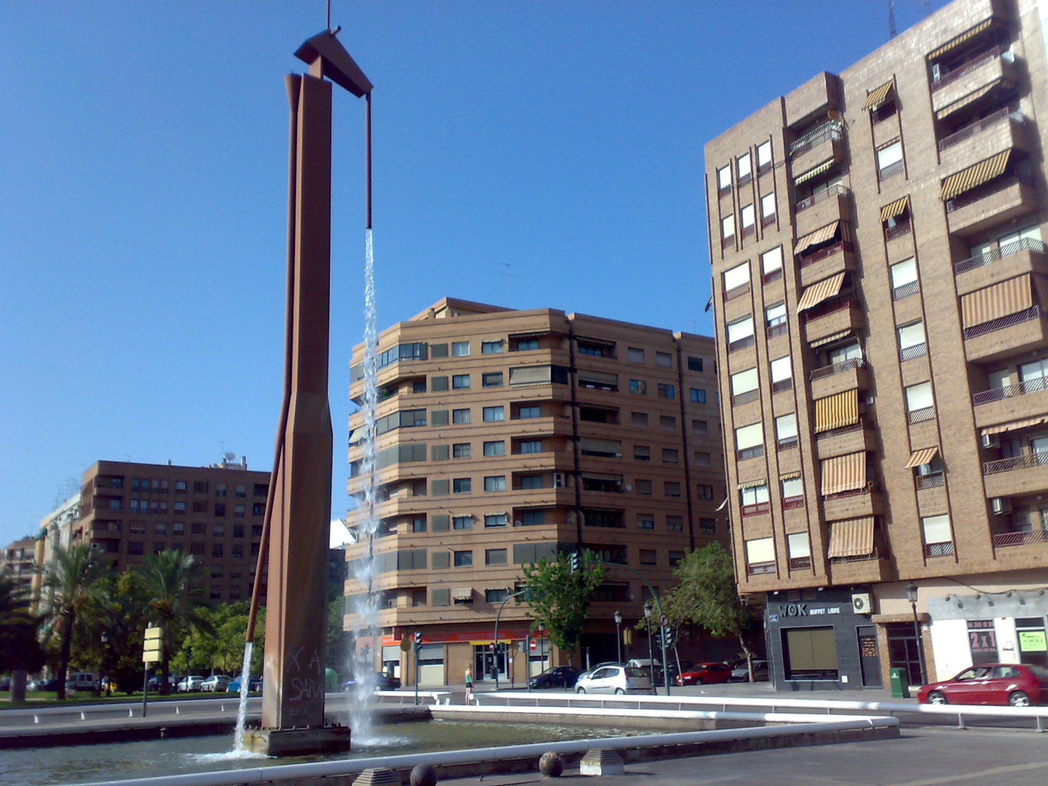 Fuente Pública, conocida popularmente como La Pantera Rosa. Escultura de Miquel Navarro, erigida en Valencia